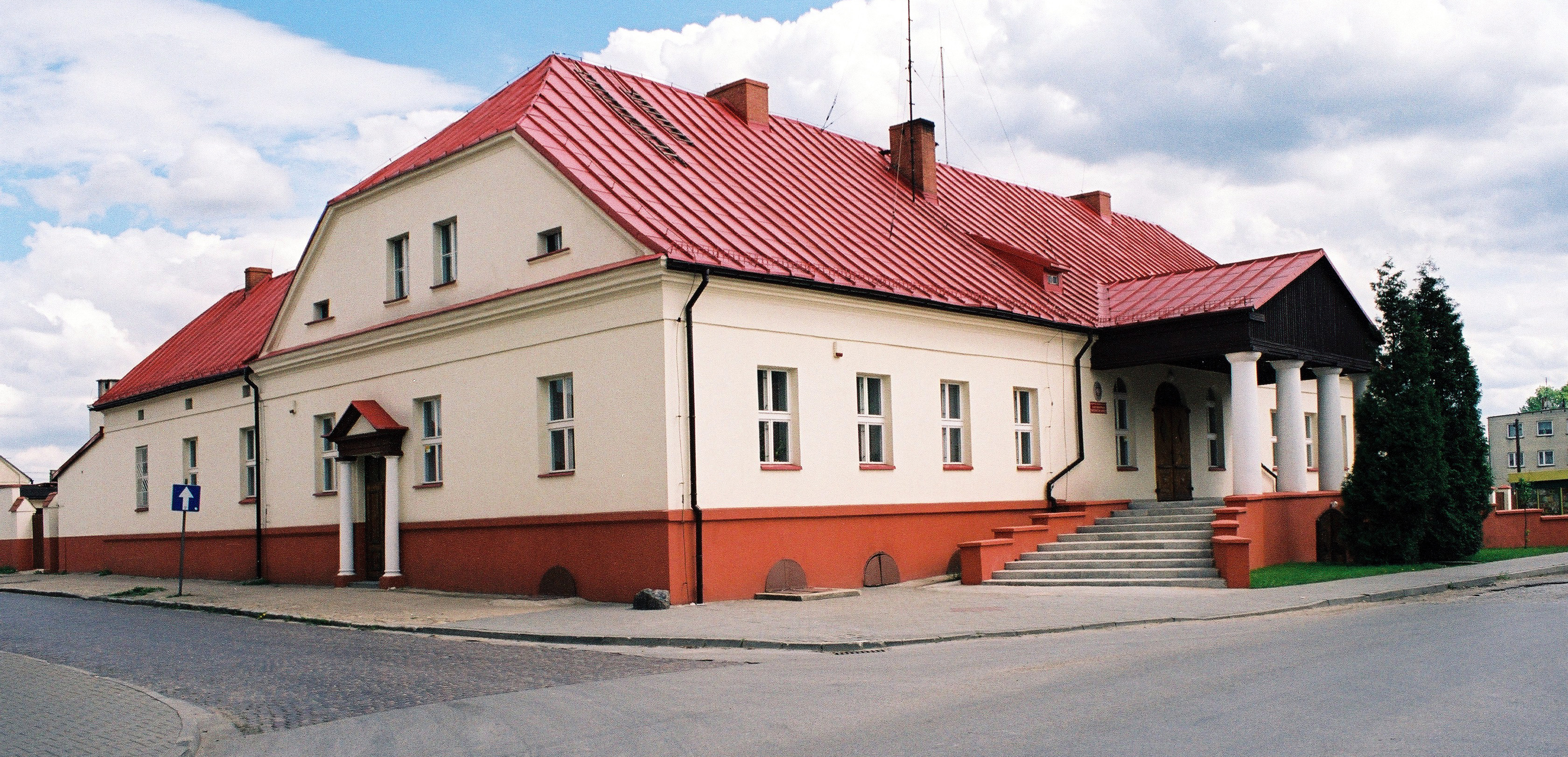 budynek nadleśnictwa w Koszęcinie, powiat lublineicki, województwo śląskie